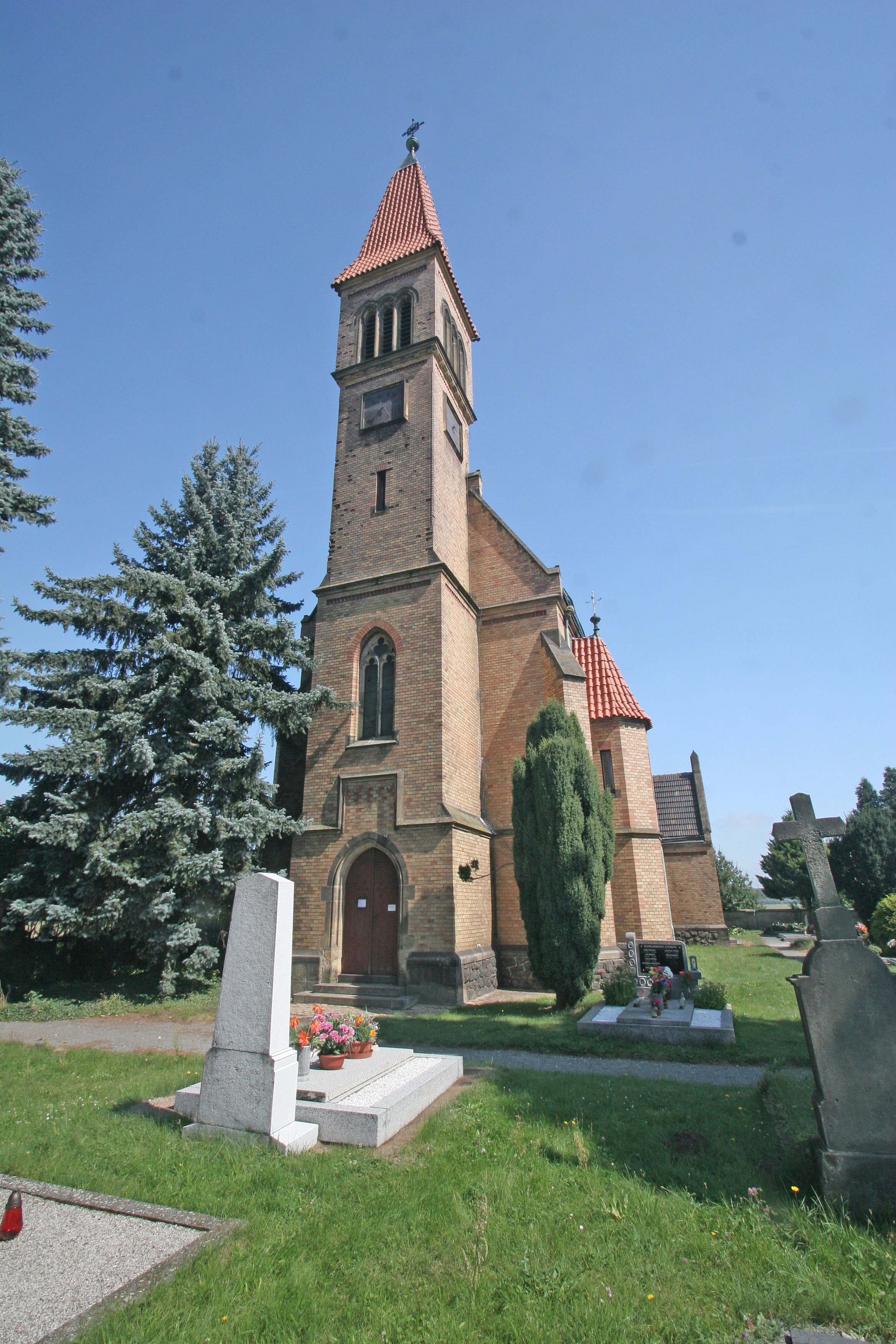 Kostel svatého Vavřince, východní část, Selmice.